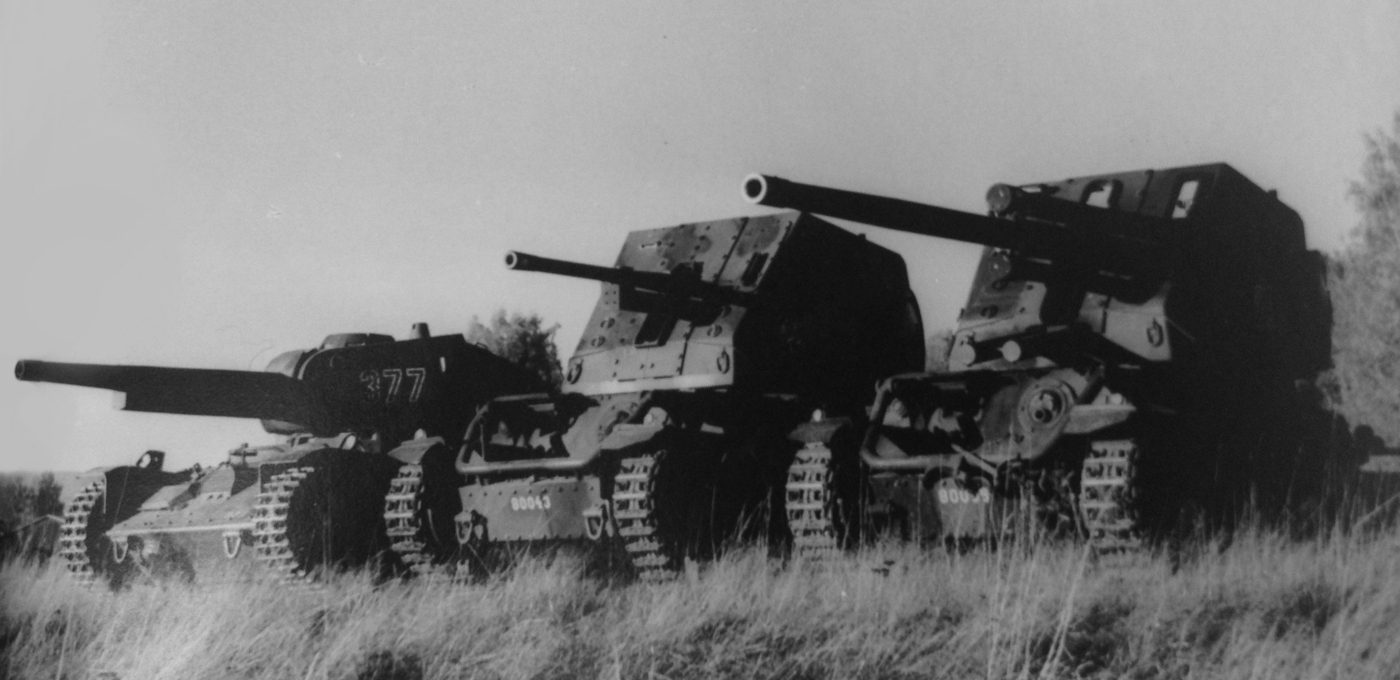 En bild på prototyperna Pvkv II, Pvkv III och Pvkv IV Värjan. Pvkv IV Värjan står till vänster och är byggd på en strv m/40 chassi. Resterande strv m/41 chassi.